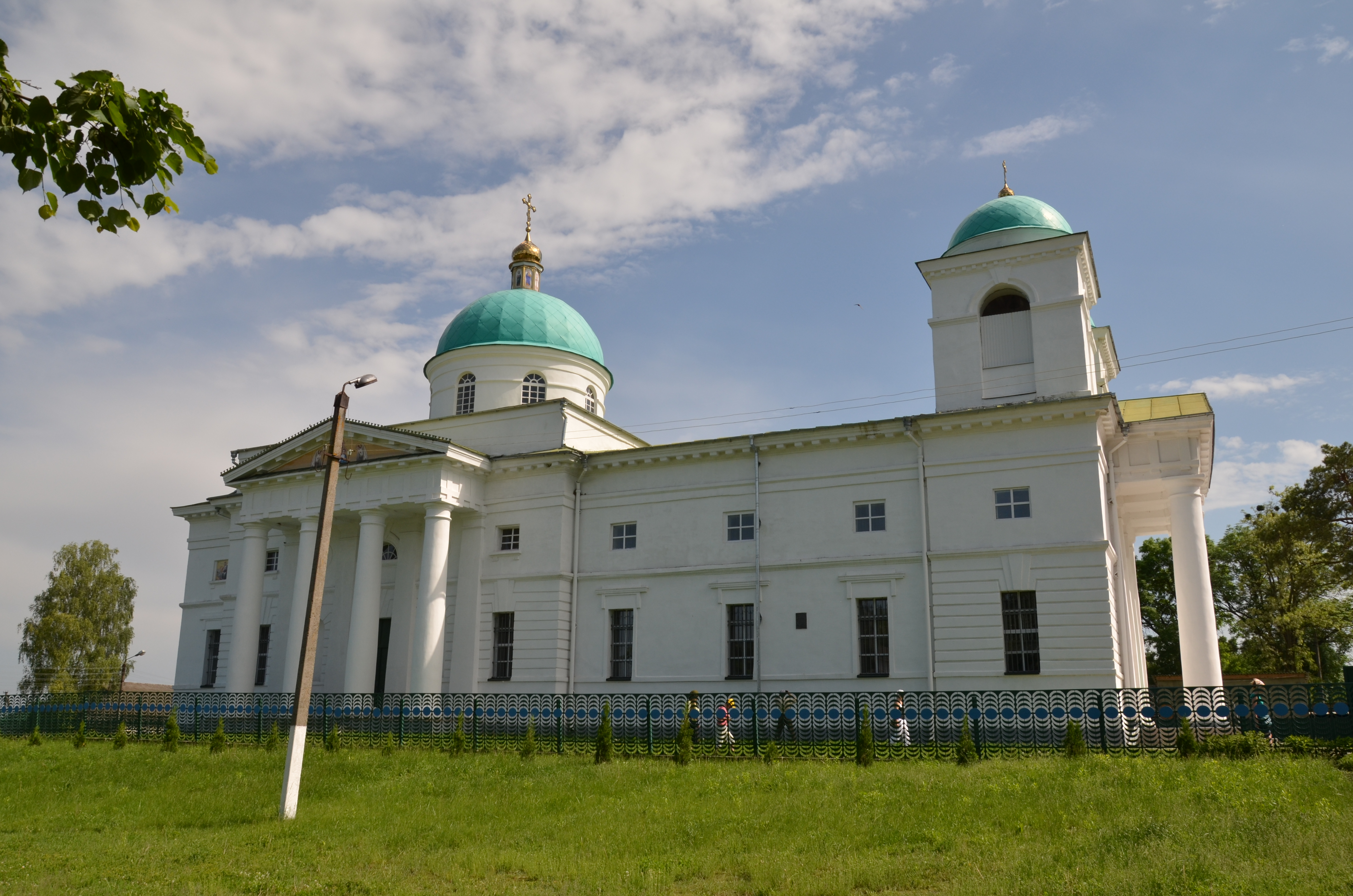 Покровська церква (мур.), село Ромашки